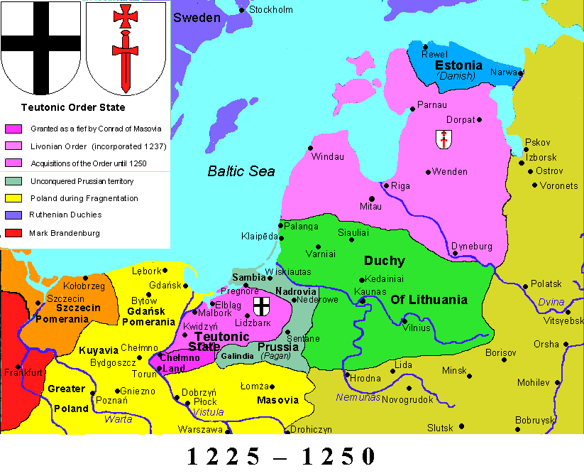 history map of Ordensstaat, 1250